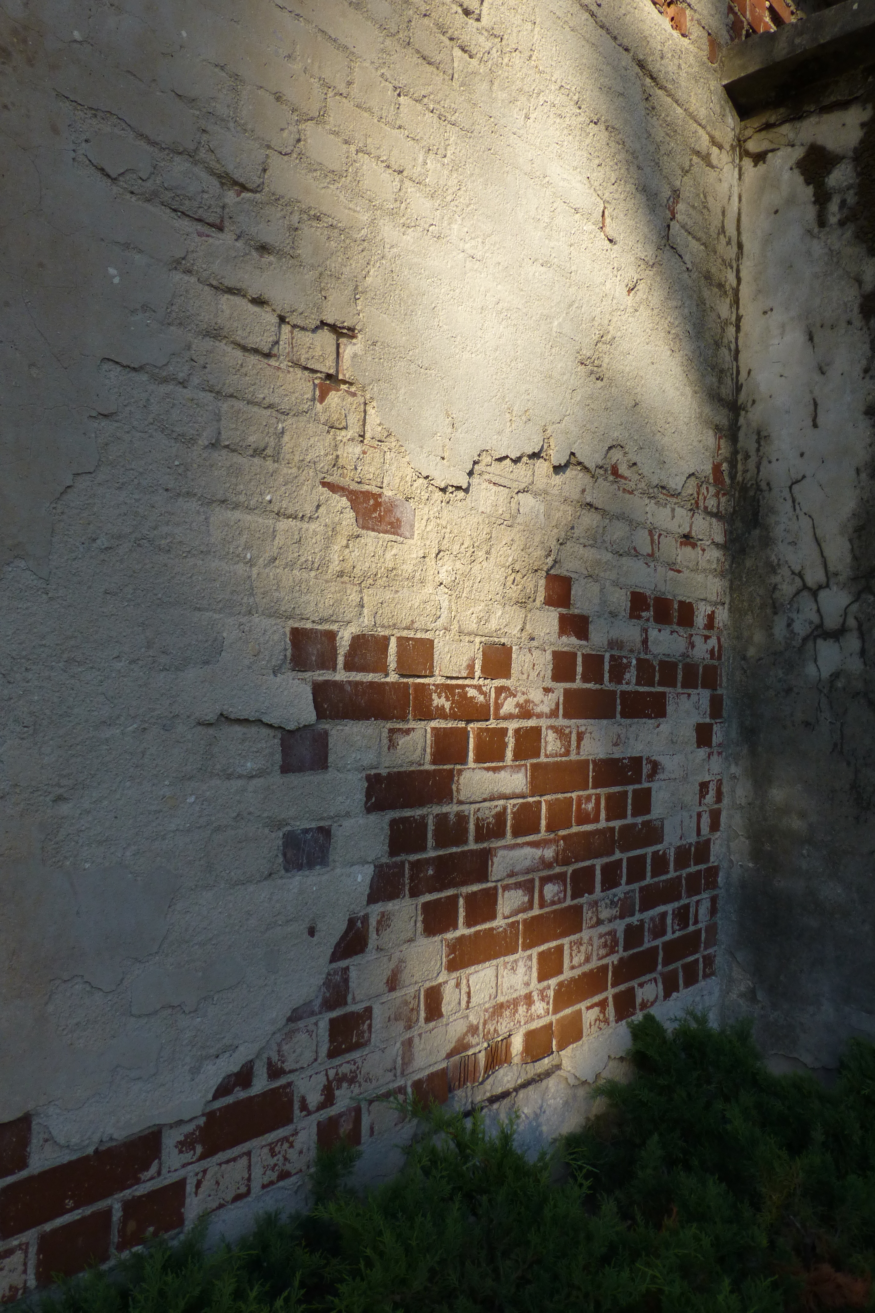 בית הקירור שימש את איכרי הכפר לאיחסון תפוחי אדמה שגידלו. הקיבולת היתה: 80 טון. בהמשך הושכר בית הקירור לשימושם של קיבוצי הסביבה תמורת תשלום. בימי מלחמת השחרור שימוש המקום לאיחסון נשק. בית הקירור אמור לעבור תהליך שימור ולהכיל בתוכו את ארכיון הישוב.